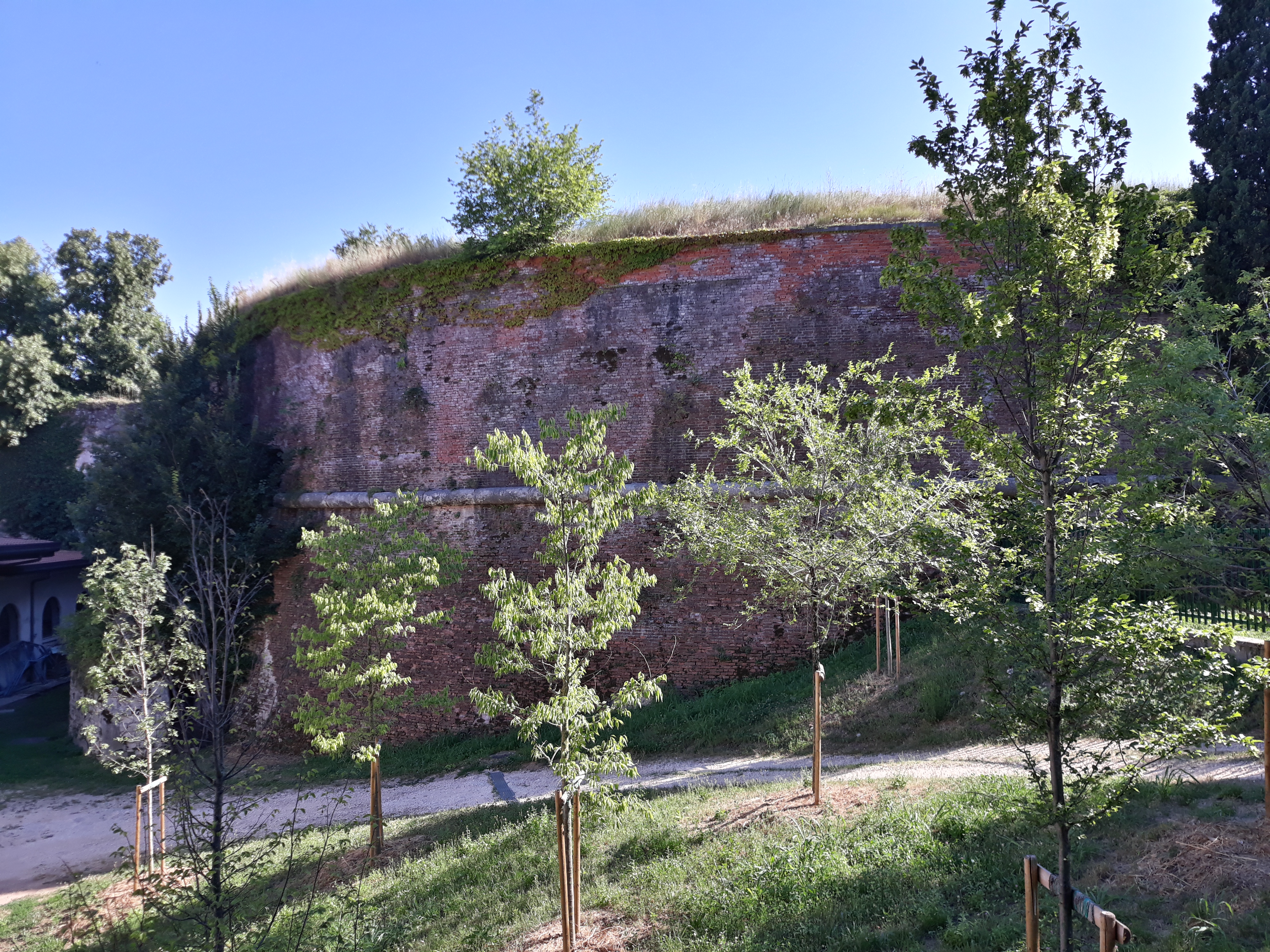 Rondella delle Boccare - mura di Verona